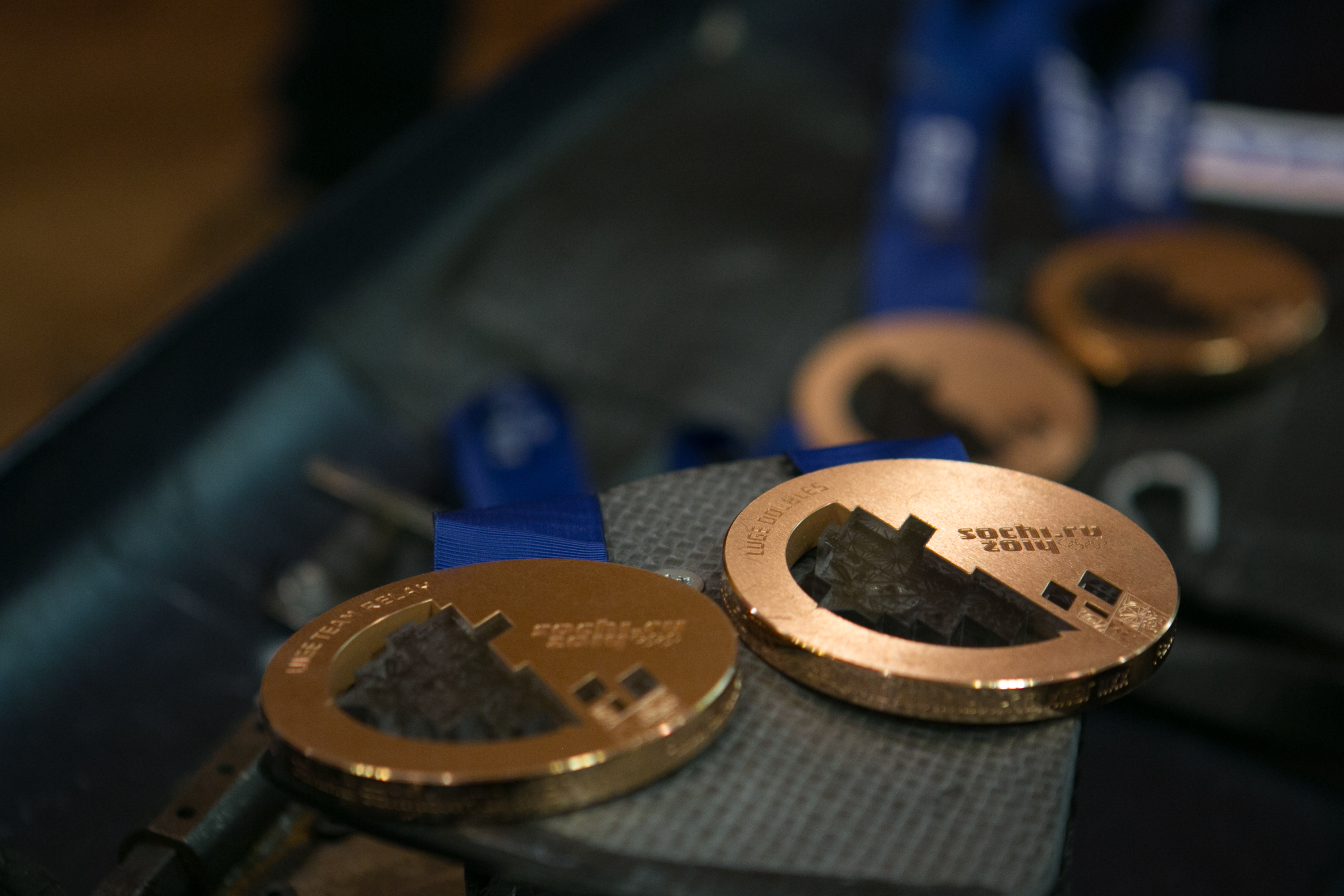 2014.gada 17.maijs. Muzeju nakts ekspozīcija "Varenie dzintara spēki no Latvijas" Saeimas namā. Foto: Ernests Dinka, Saeimas Kanceleja Izmantošanas noteikumi: saeima.lv/lv/autortiesibas